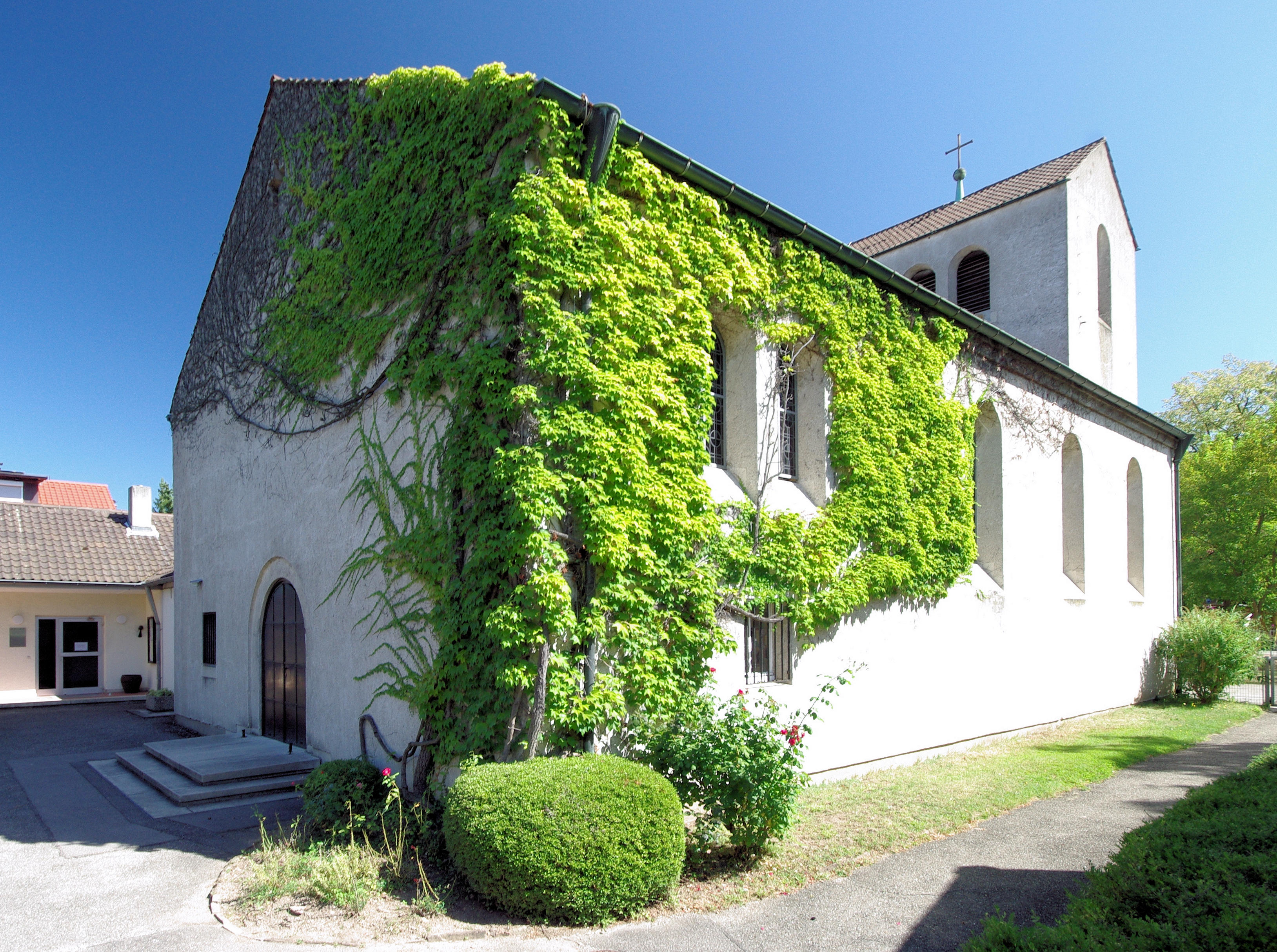 Lukaskirche